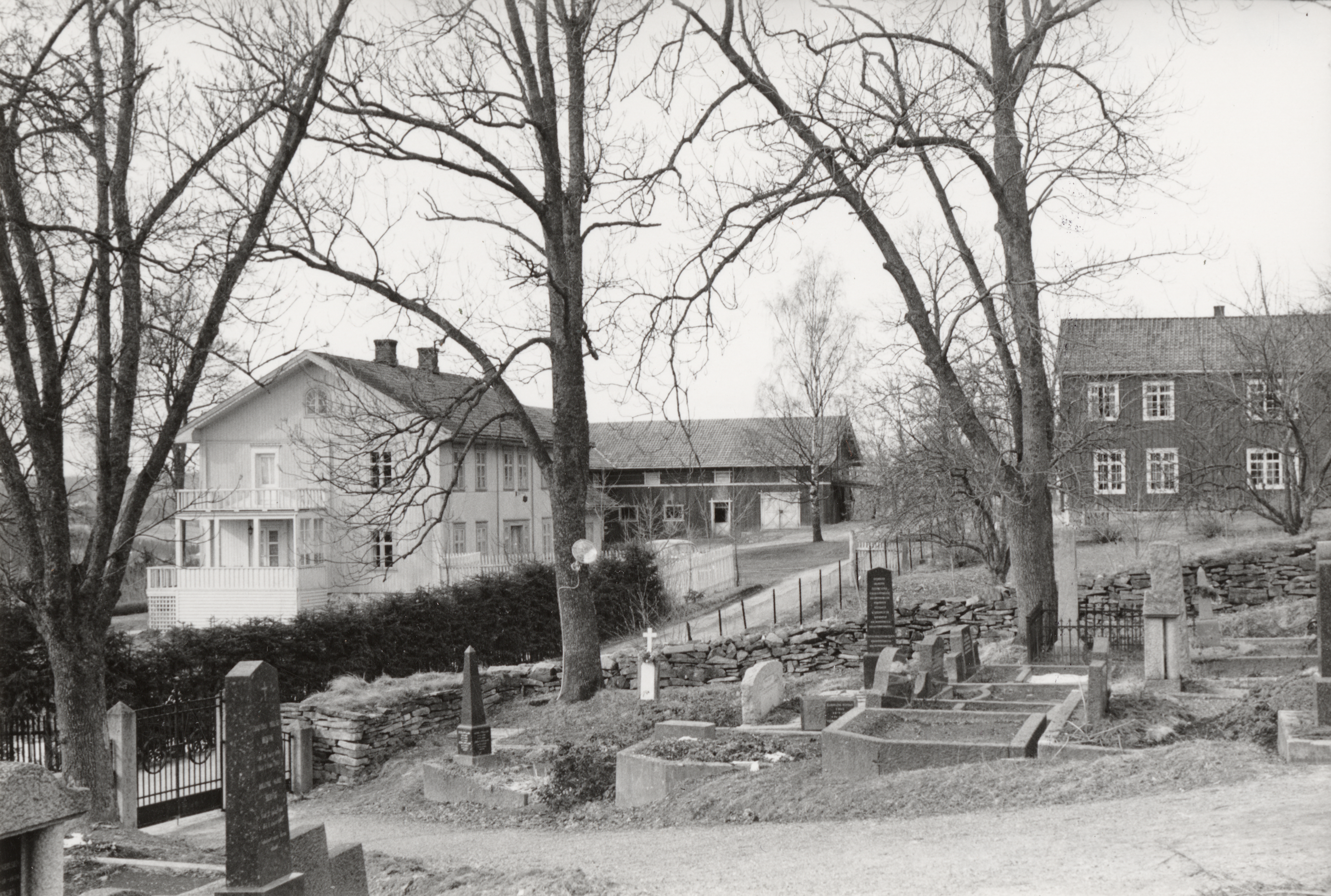 Heggen prestegård, Modum prestegård i Heggen, Buskerud This image on crowdsourcing geotagging platform Fotodugnad